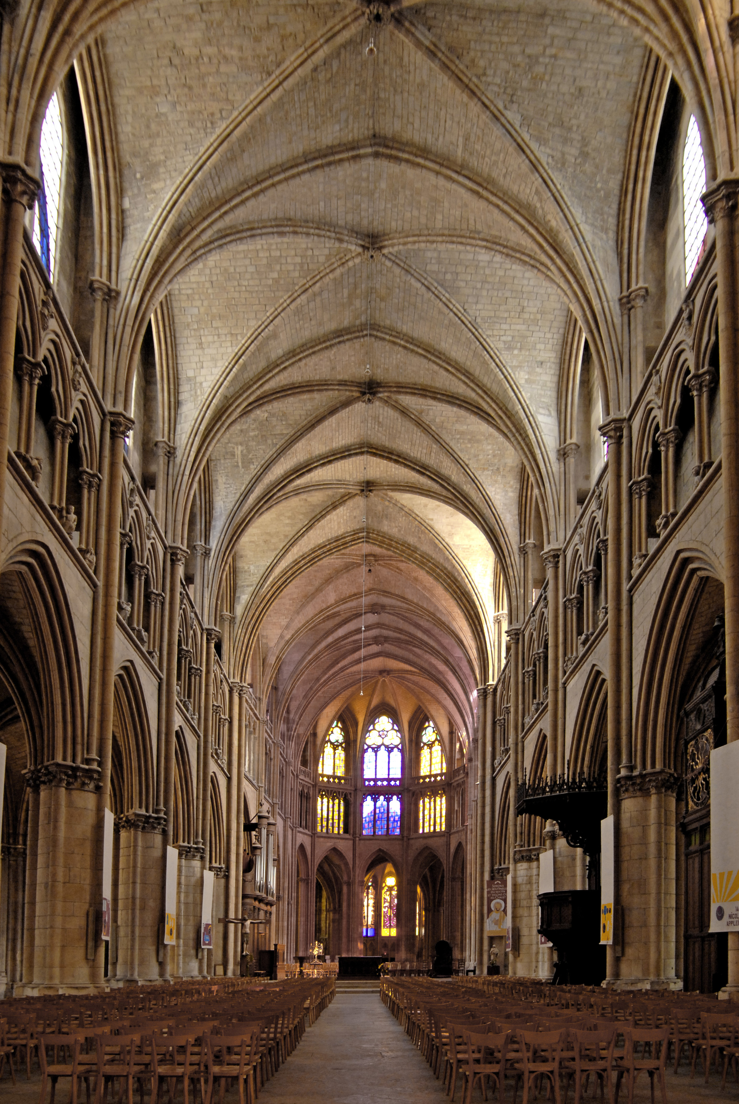 Kathedrale Nevers, Mittelschiff zum Chor